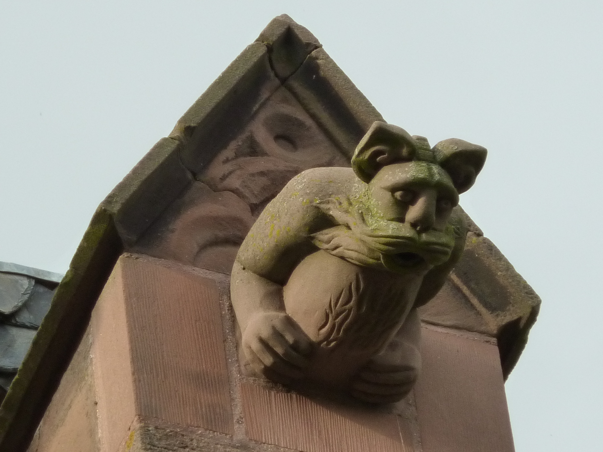 St. Mariä Heimsuchung (Frauwüllesheim)